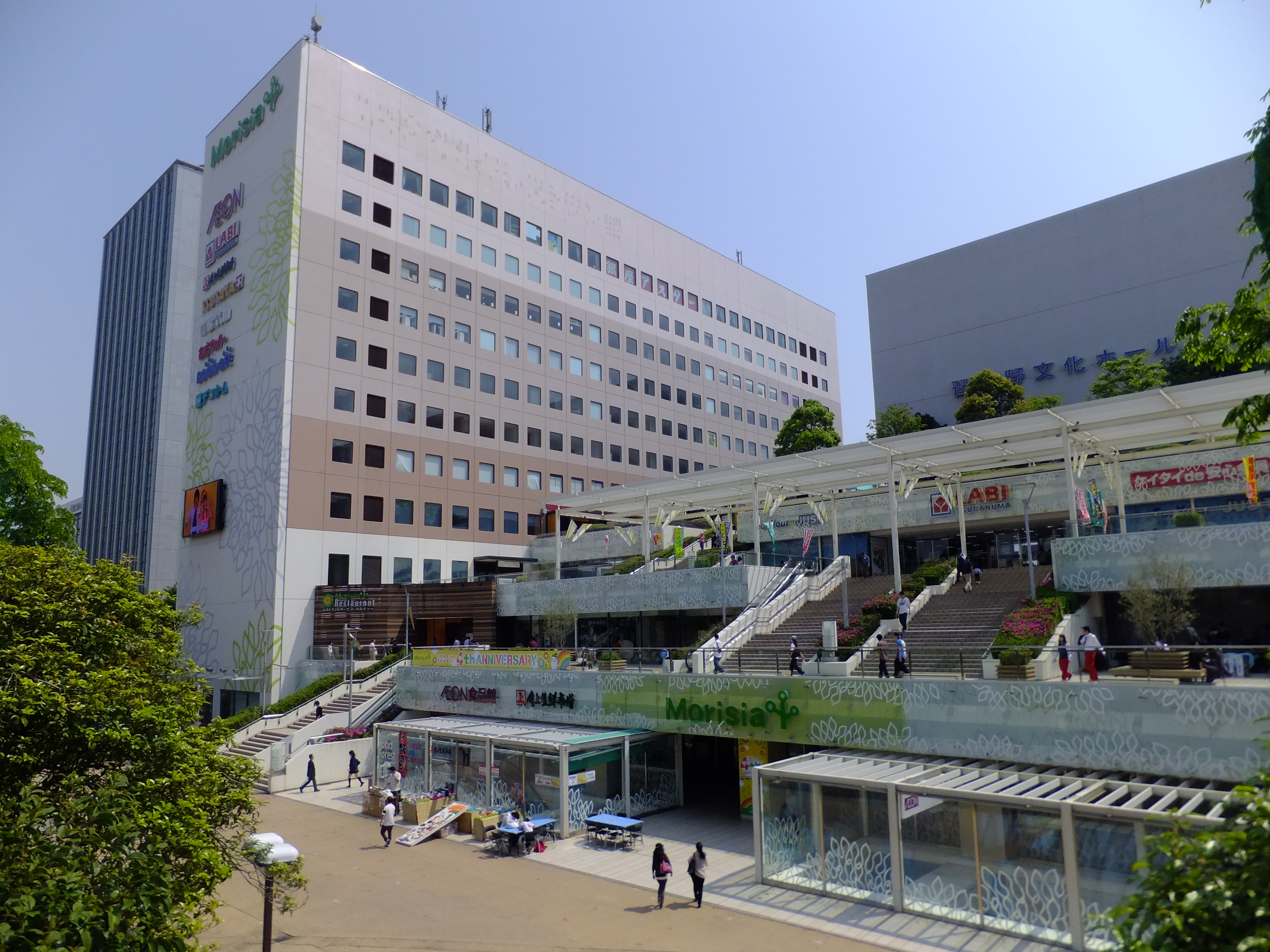 モリシア津田沼、Morisia Shop棟(右側低層棟)とMorisia Restaurant棟(左側高層棟)